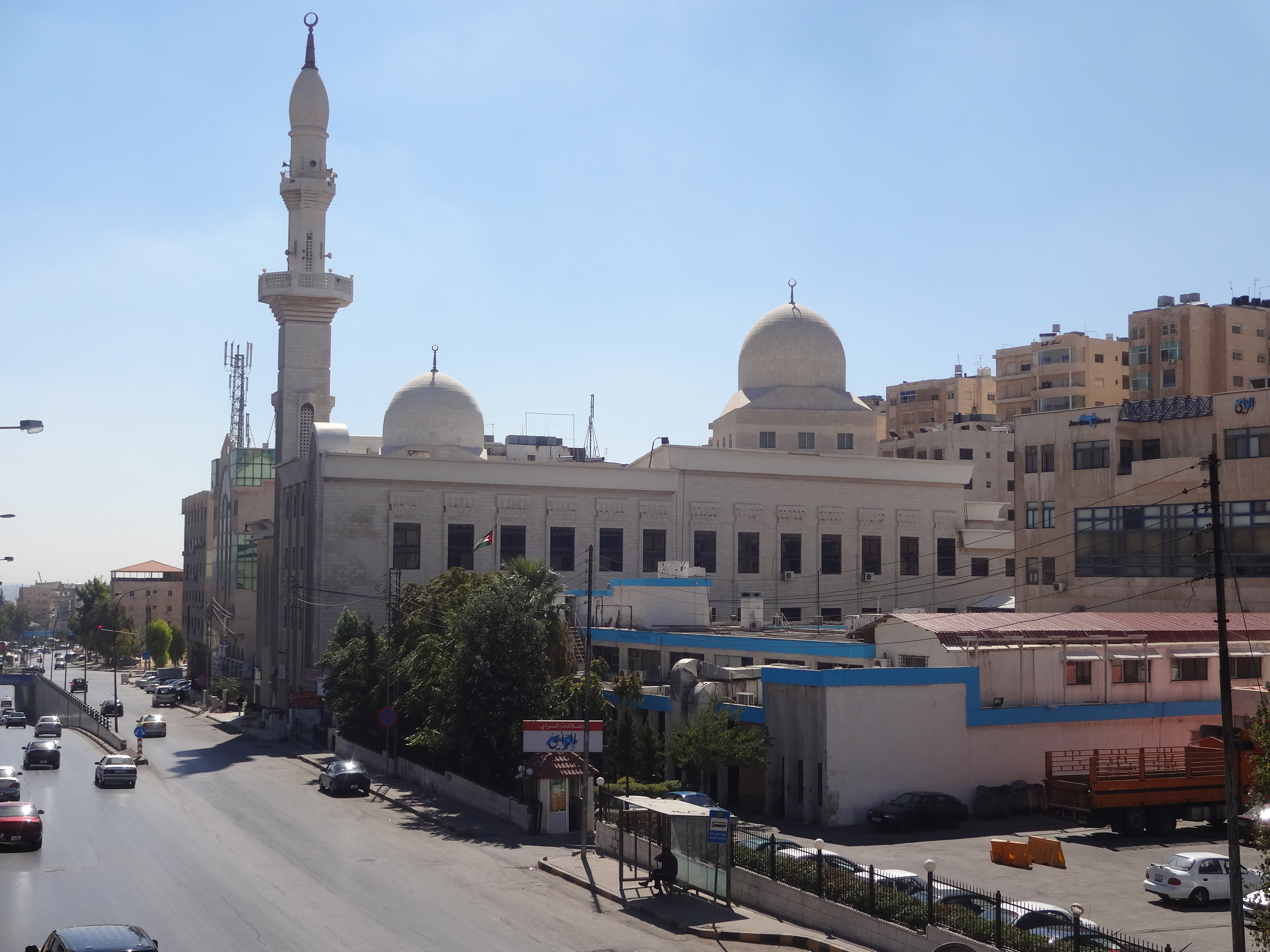 Abu Qura Mosque, Amman